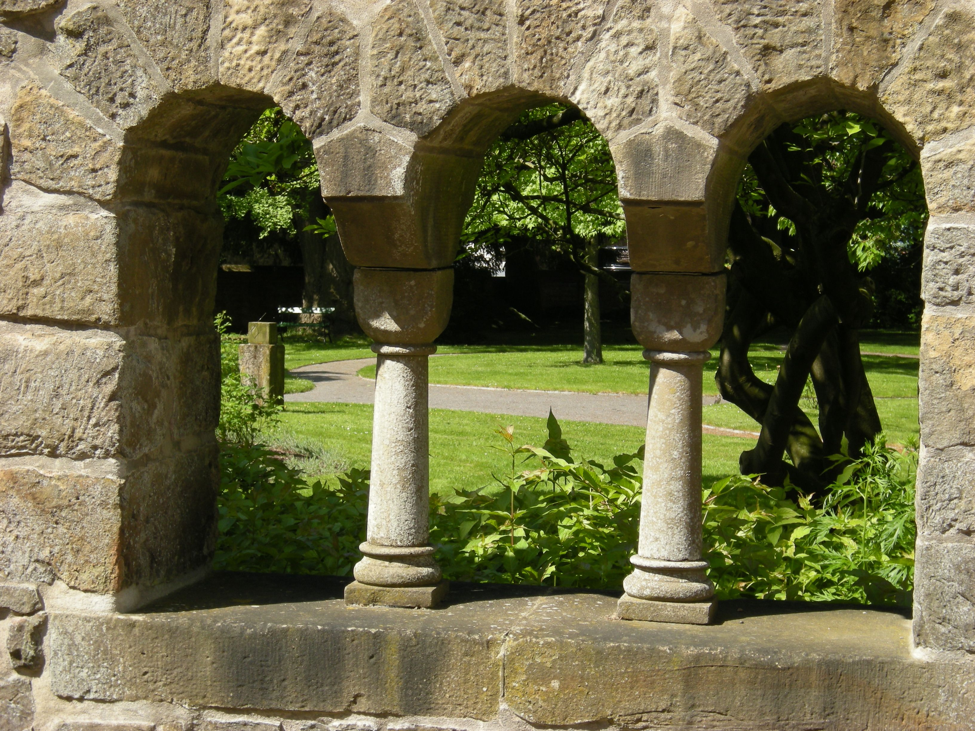 Hessisch Oldendorf - Stift Fischbeck - Fenster im Kreuzgang